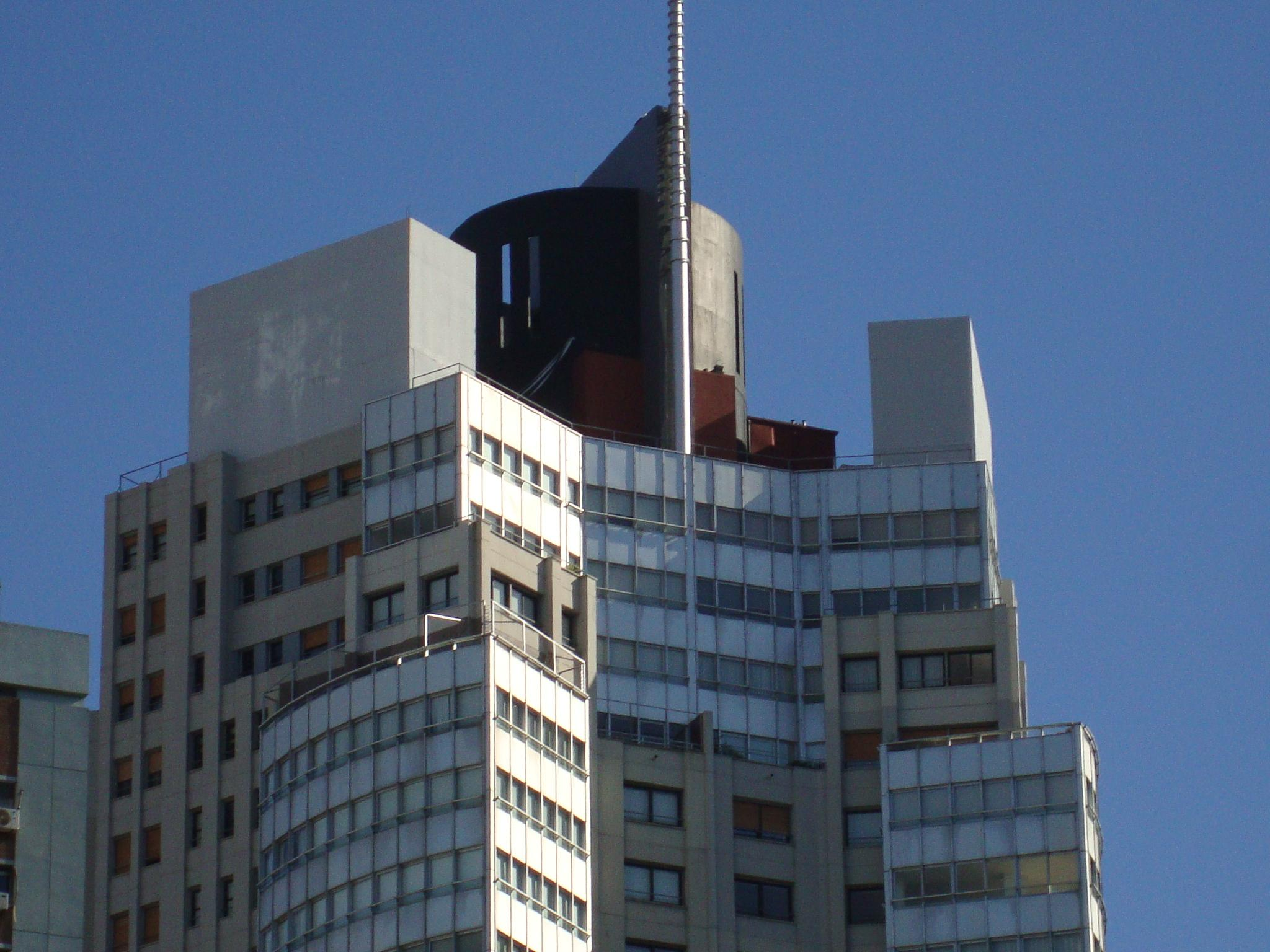 Coronamiento de una de las Torres Alto Palermo Plaza y Parque. Se encuentran entre las calles Juncal, Jerónimo Salguero y Bulnes. La antena alcanza los 133 metros de altura. Buenos Aires, Argentina.